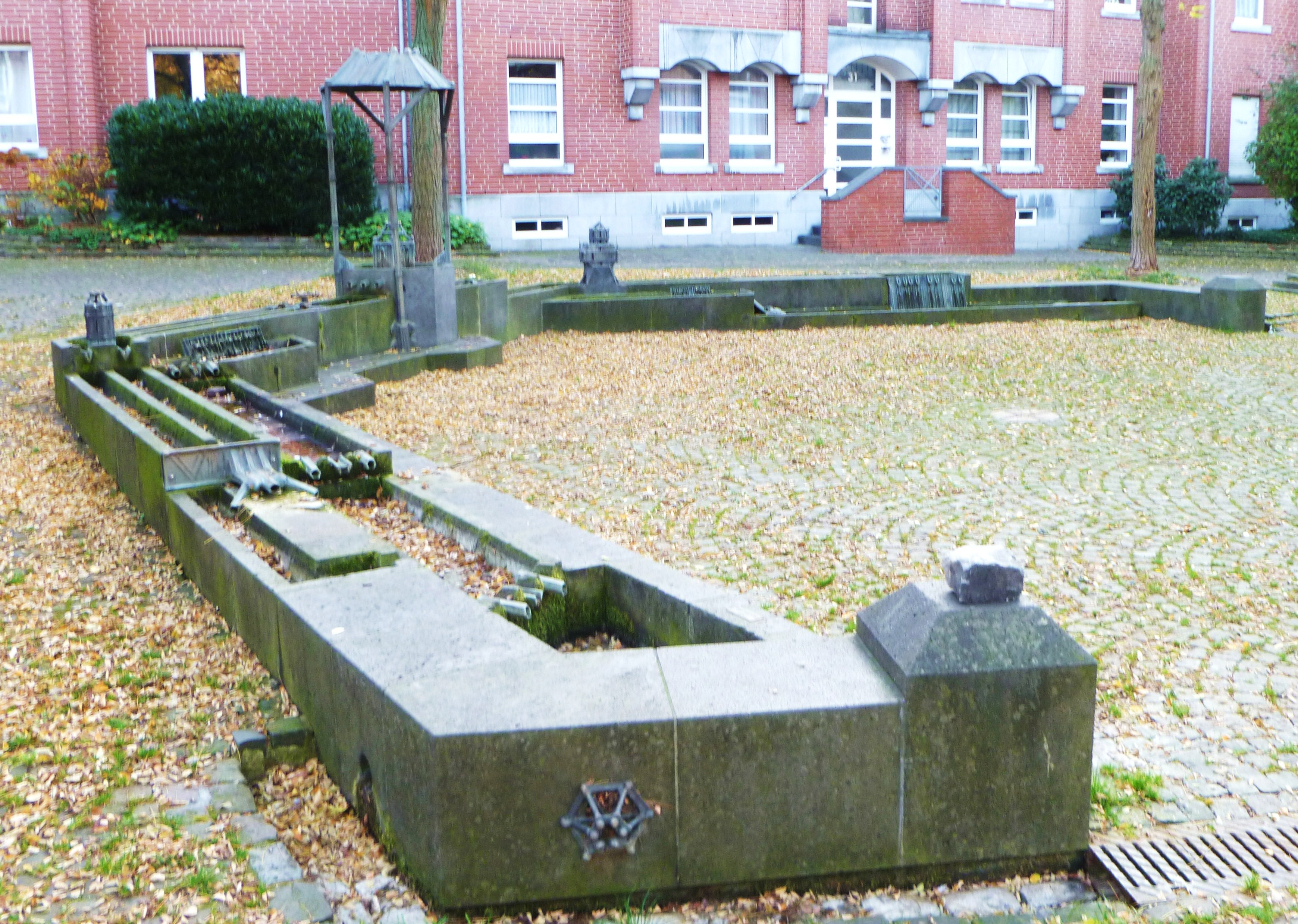 Große Brunnenanlage Kuckhoffstraße Aachen, Benno Werth, 1993